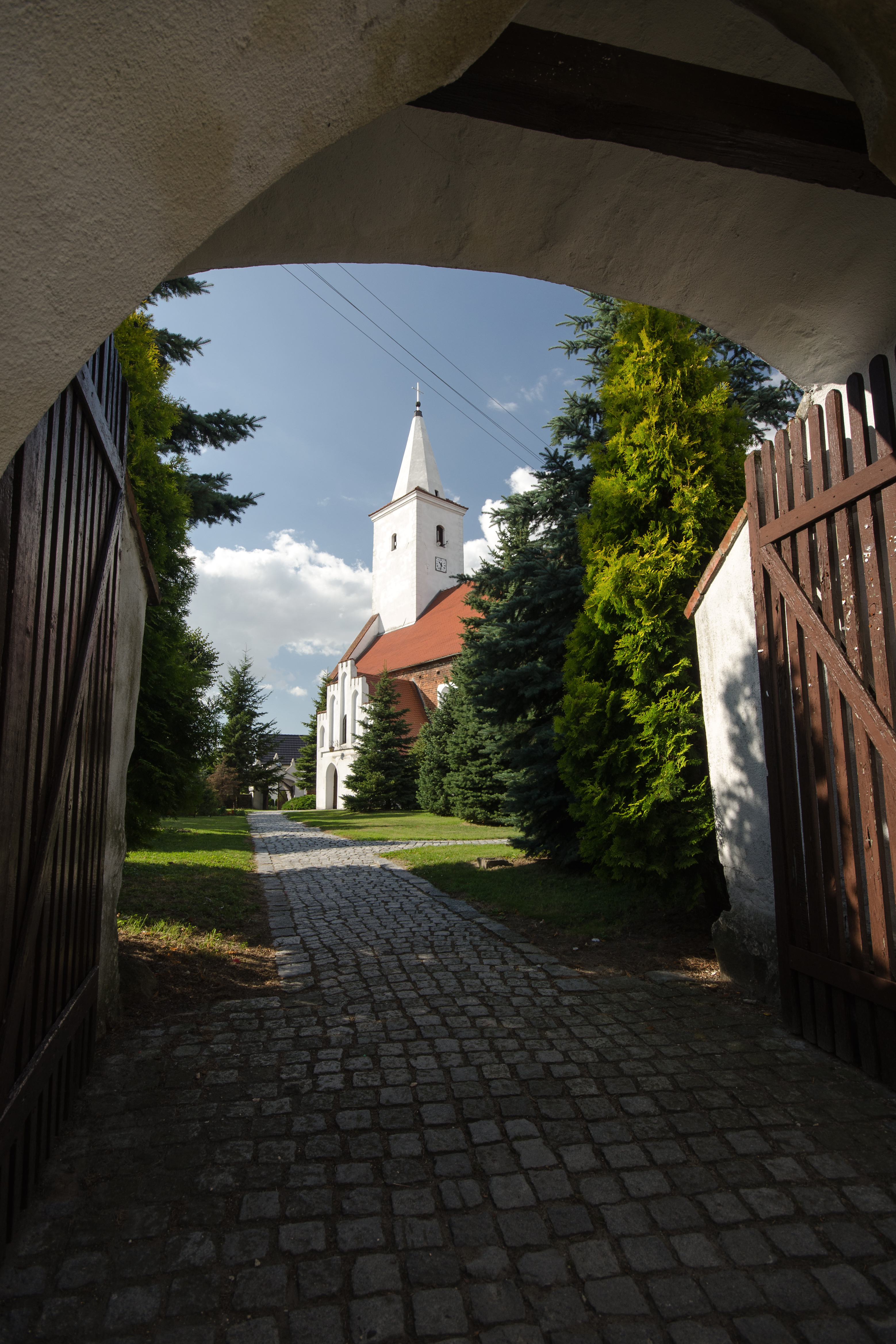 Pogorzela, kościół par. p.w. Najśw. Serca Jezusa, 1 poł. XIV, XVII, XVIII